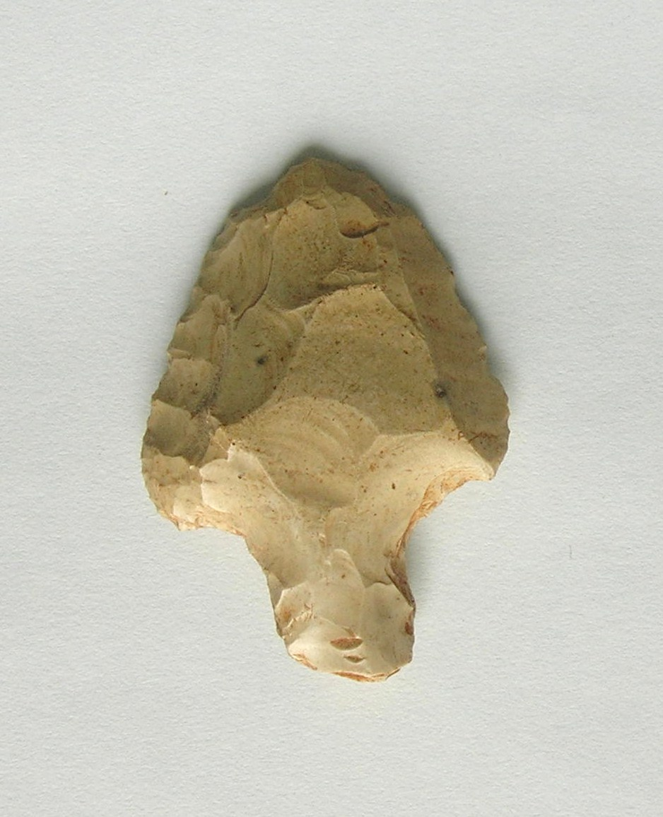 Atérien, région de Djelfa (Zaccar), Algérie.